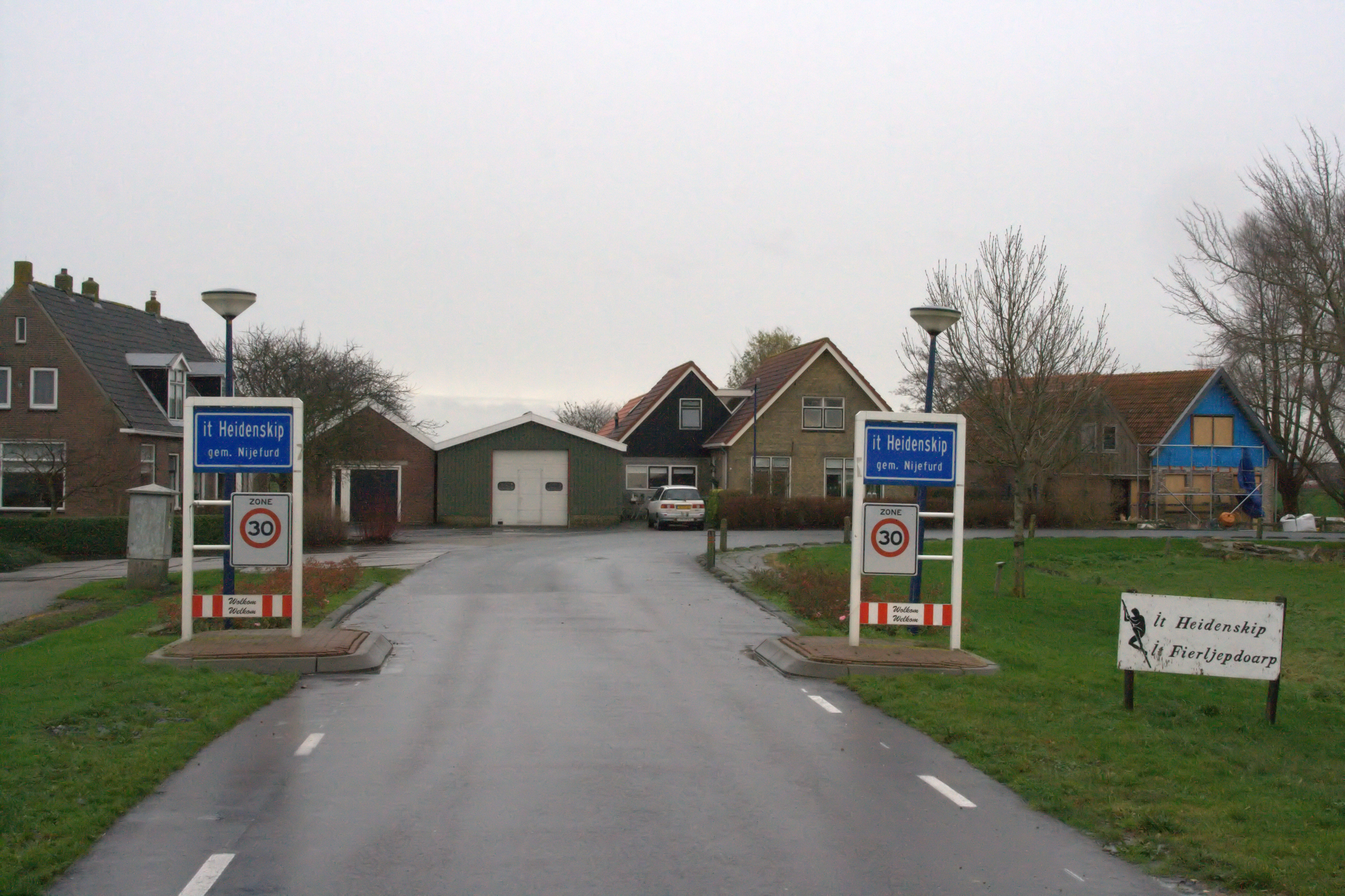 It Heidenskip - plaatsnaambordjes